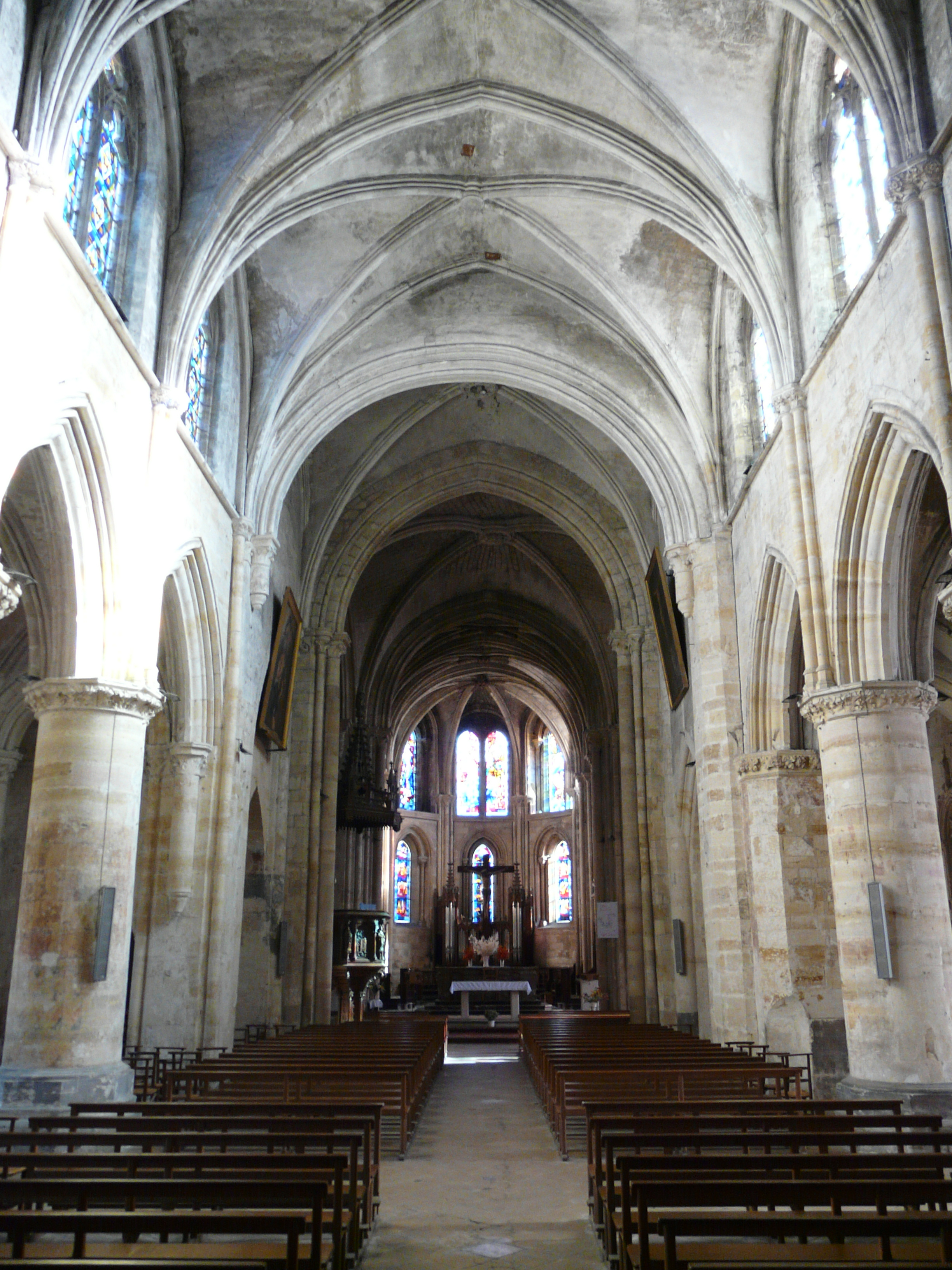 Eglise Notre Dame de Bar-le-Duc : la nef